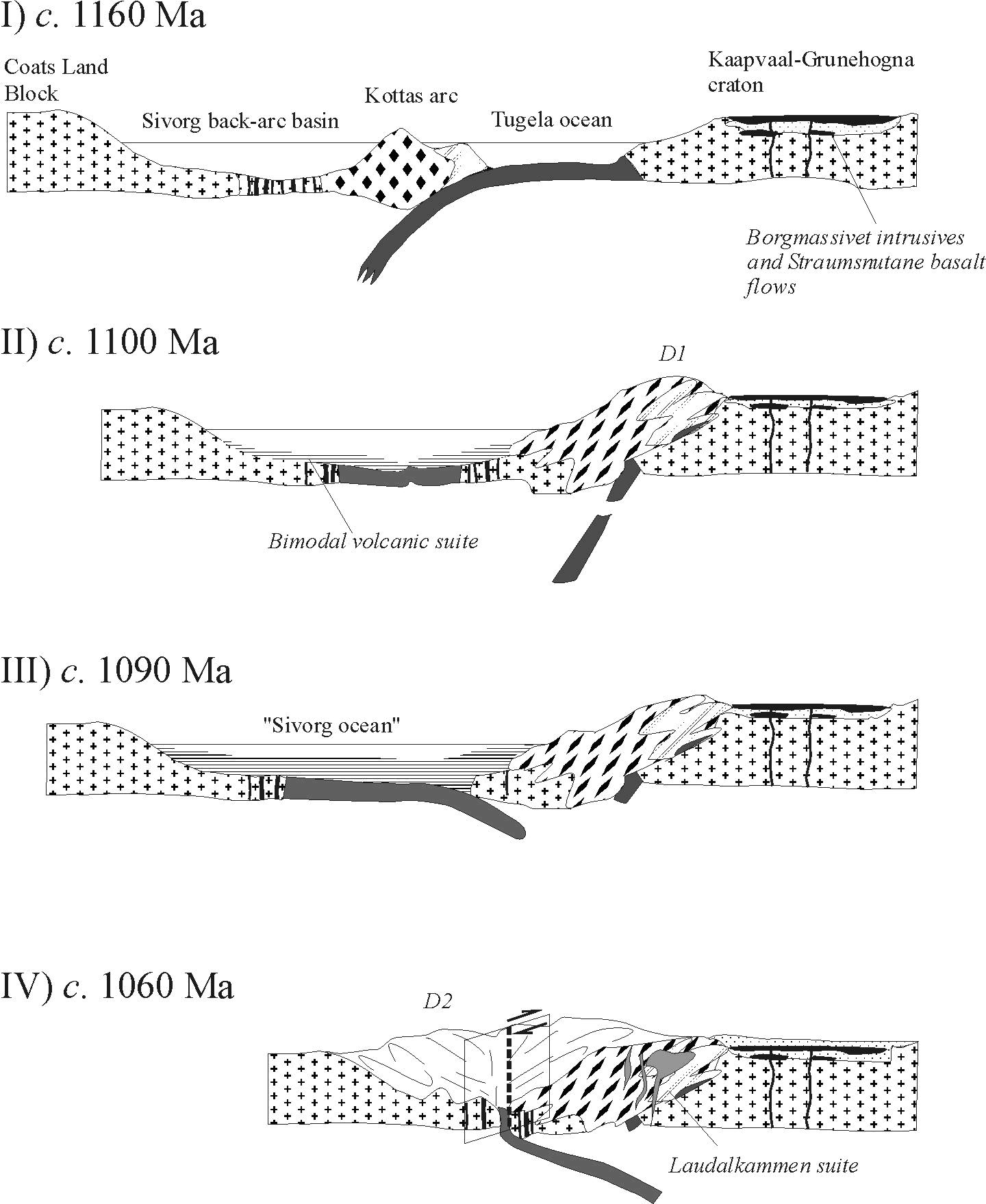 Modell der geologischen Entwicklung Neuschwabenlands